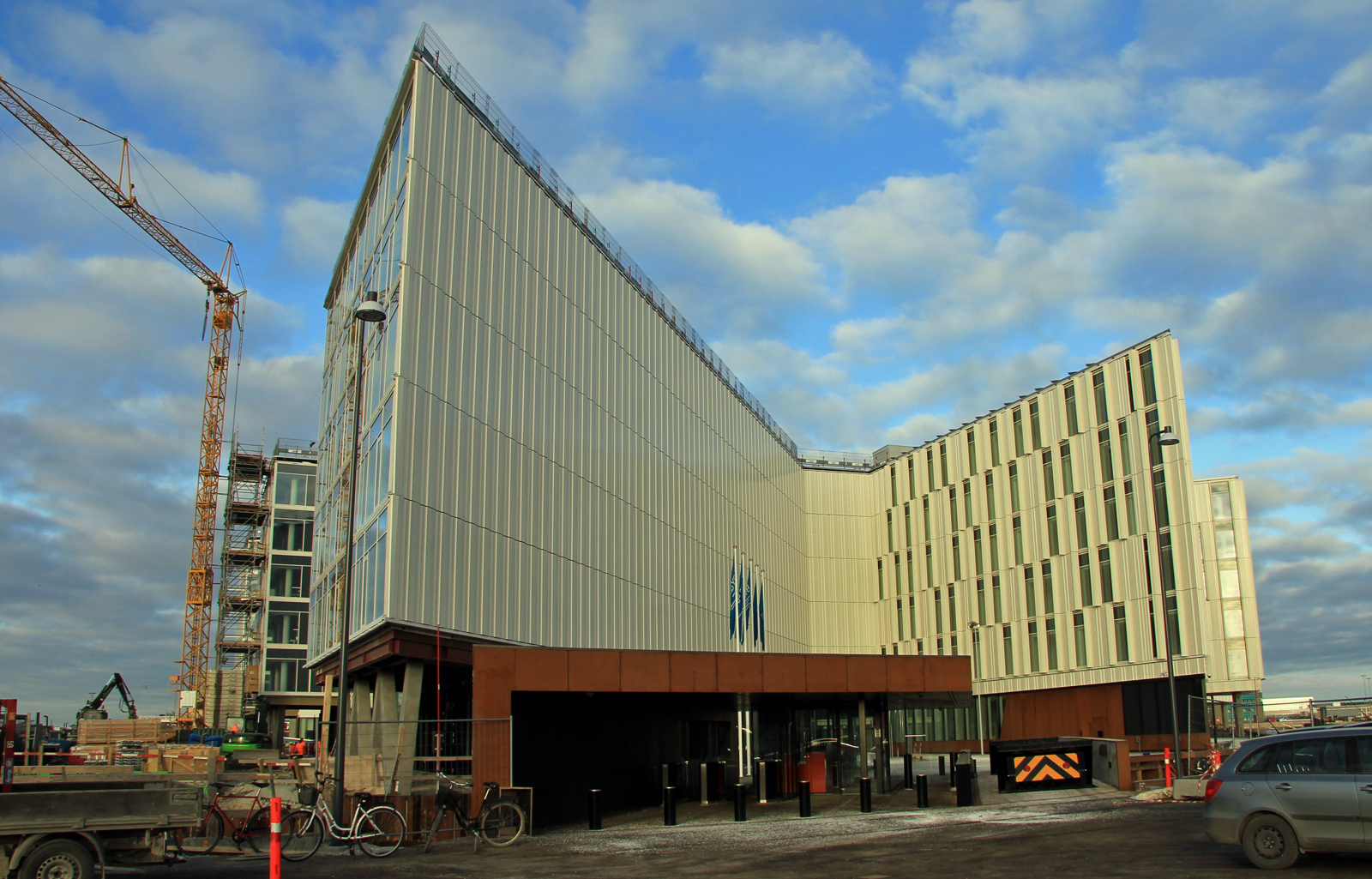 FN-Byen på Marmormolen i København.